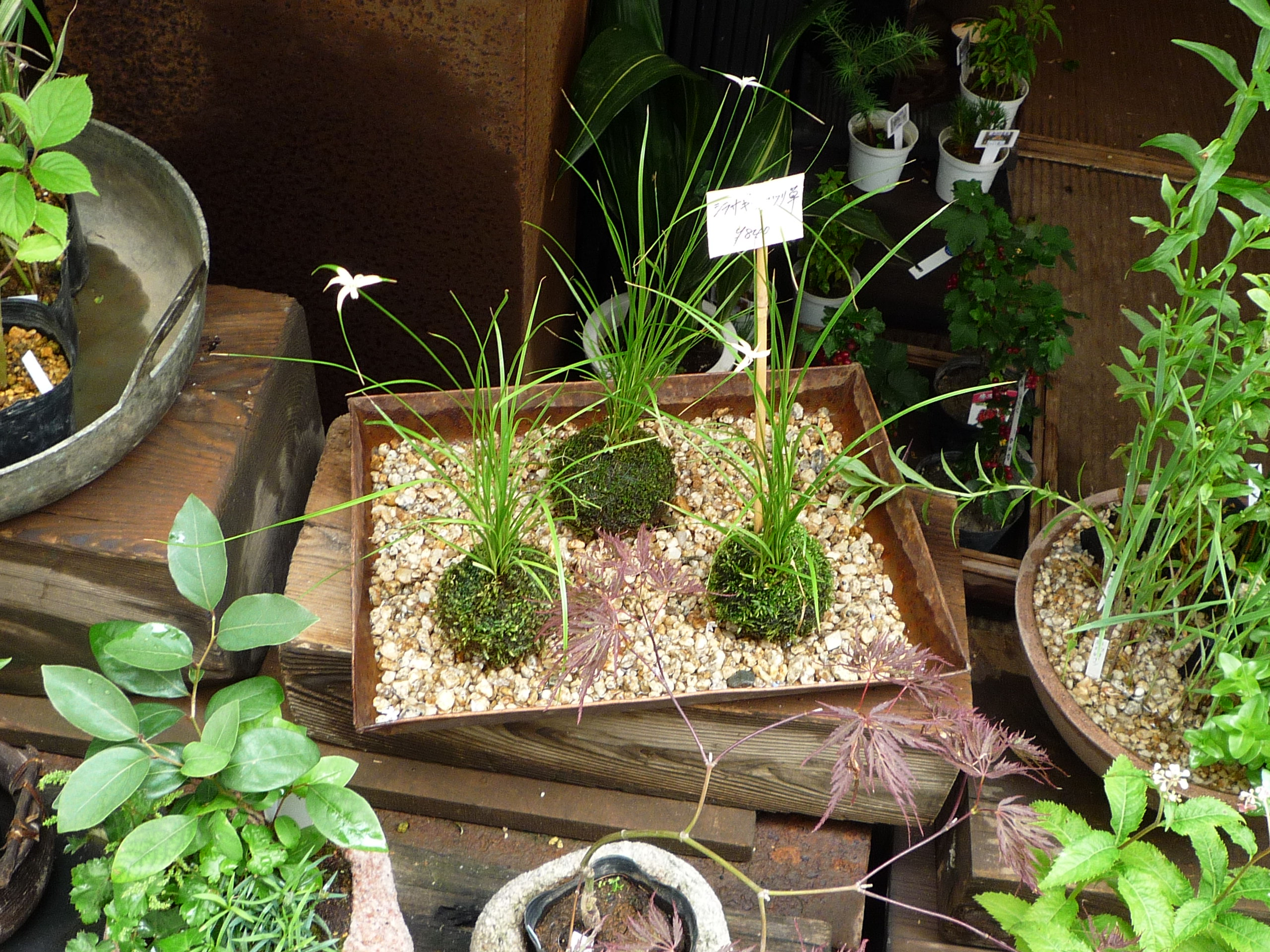 Kokedama d'orchidée Habenaria Radiata - Japon